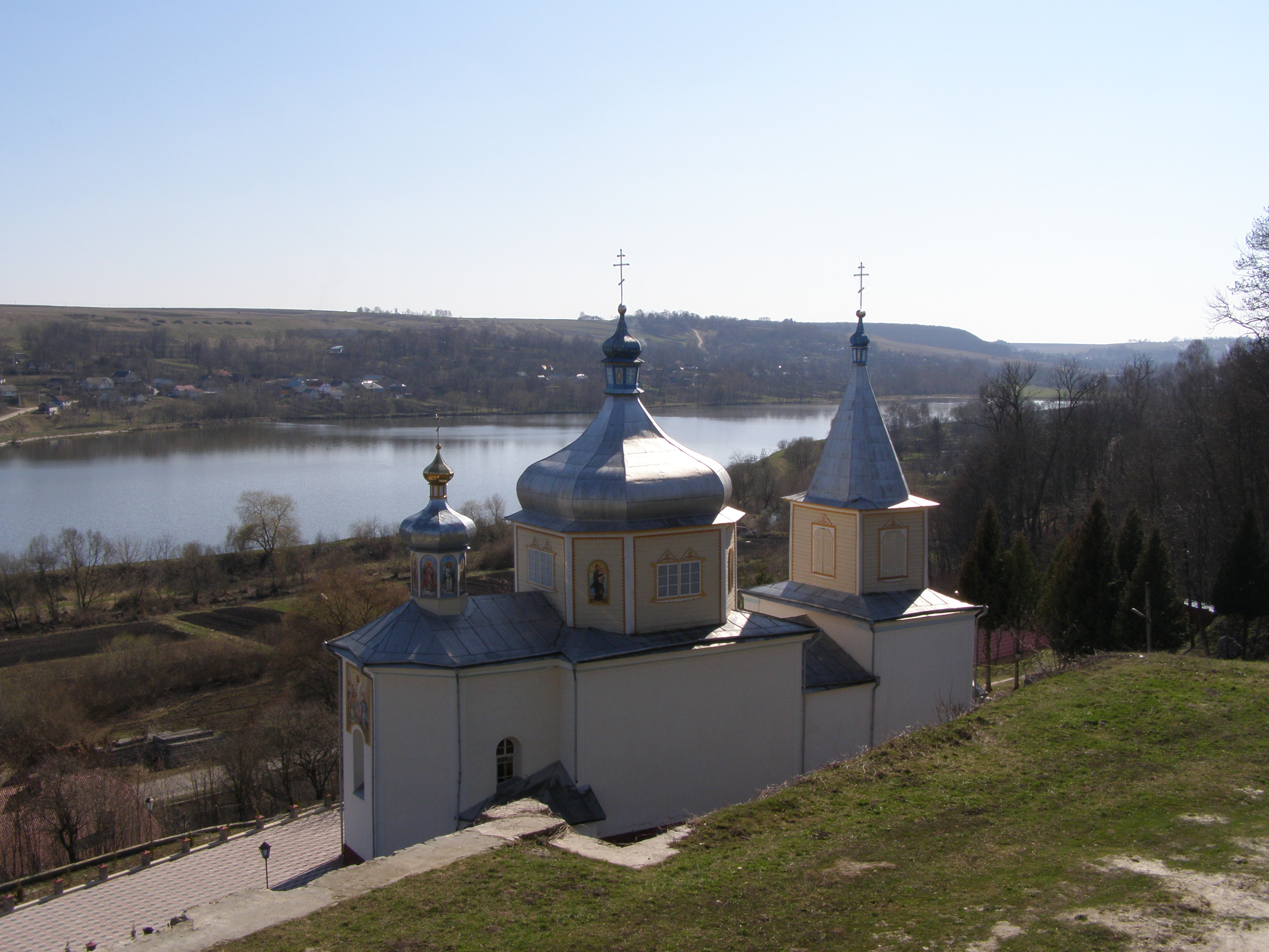 Вознесенская церковь (1530) в Вишневце.